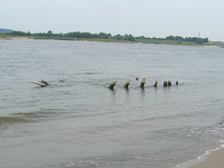 Vermutliches Wrack der "De Hoop". Gesehen bei niedrigem Wasserstand.